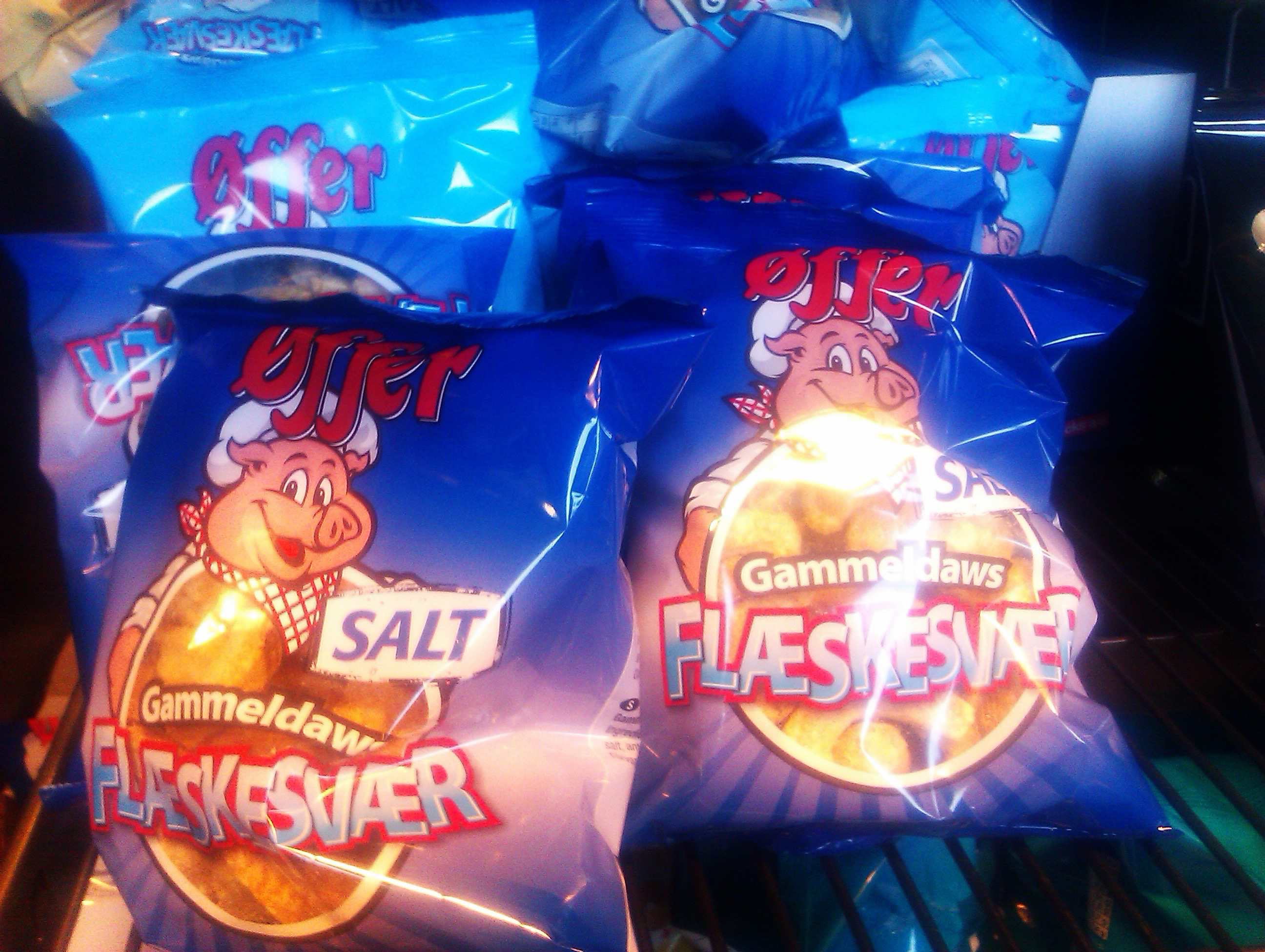 Flæskesvær, Danmark